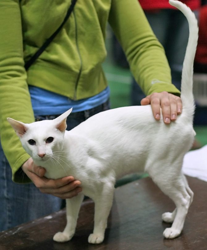 Un foreign white présenté en exposition féline à Helsinki. GIC Arhantin Samuli [SIA w 67] male EX1 CAP